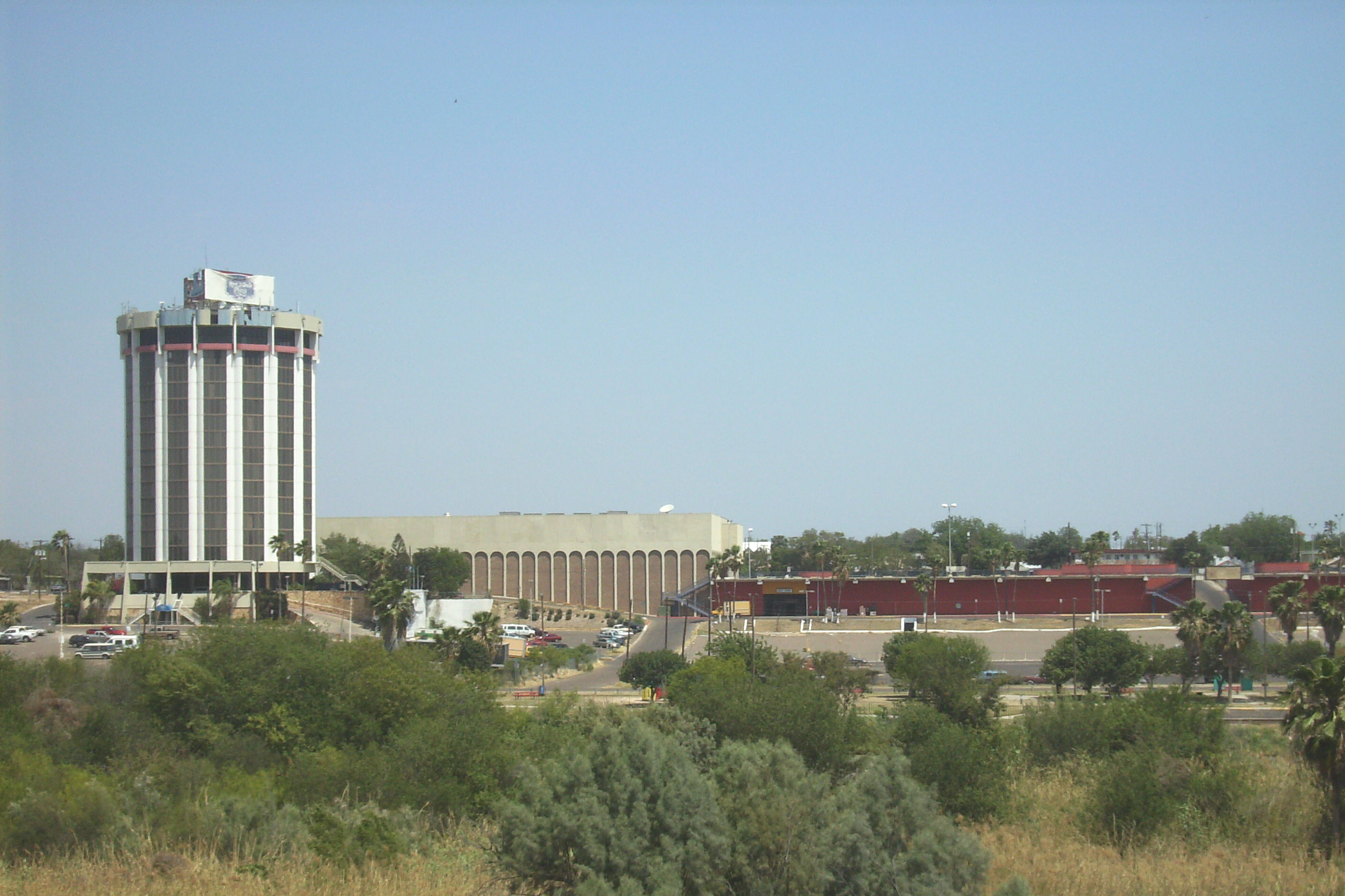 El Portal Mall view from Nuevo Laredo